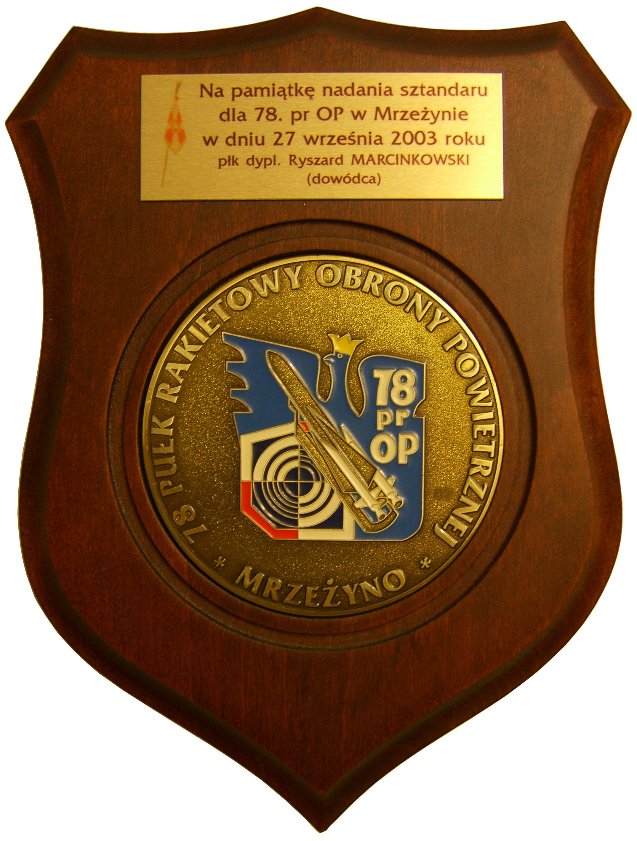 Pamiątka nadania sztandaru dla 78 Pułku Rakietowego Obrony Powietrznej